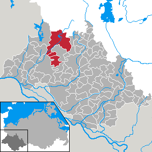 Former Amt Wittenburg-Land in Mecklenburg-Vorpommern - district Ludwigslust